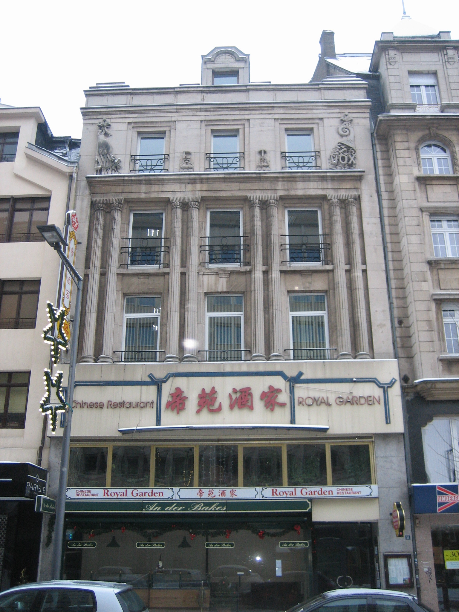 Sujet: De fréiere Ciné Capitole, an der Aler Avenue an der Stad Lëtzebuerg. Auteur vun der Foto: Zinneke, am Dezember 2010. Lizenz: CC-by-sa